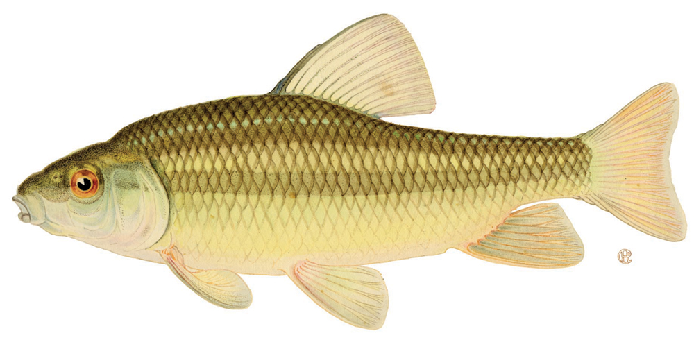 Lake Chubsucker (Erimyzon sucetta)